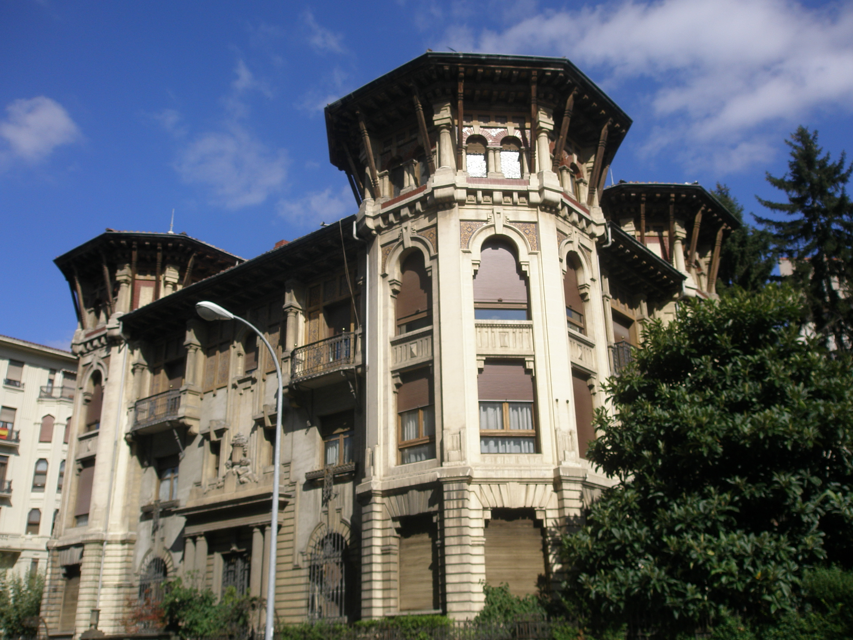 Palacete de varias viviendas en el Segundo Ensanche. Obra de Víctor Eusa. 1924.